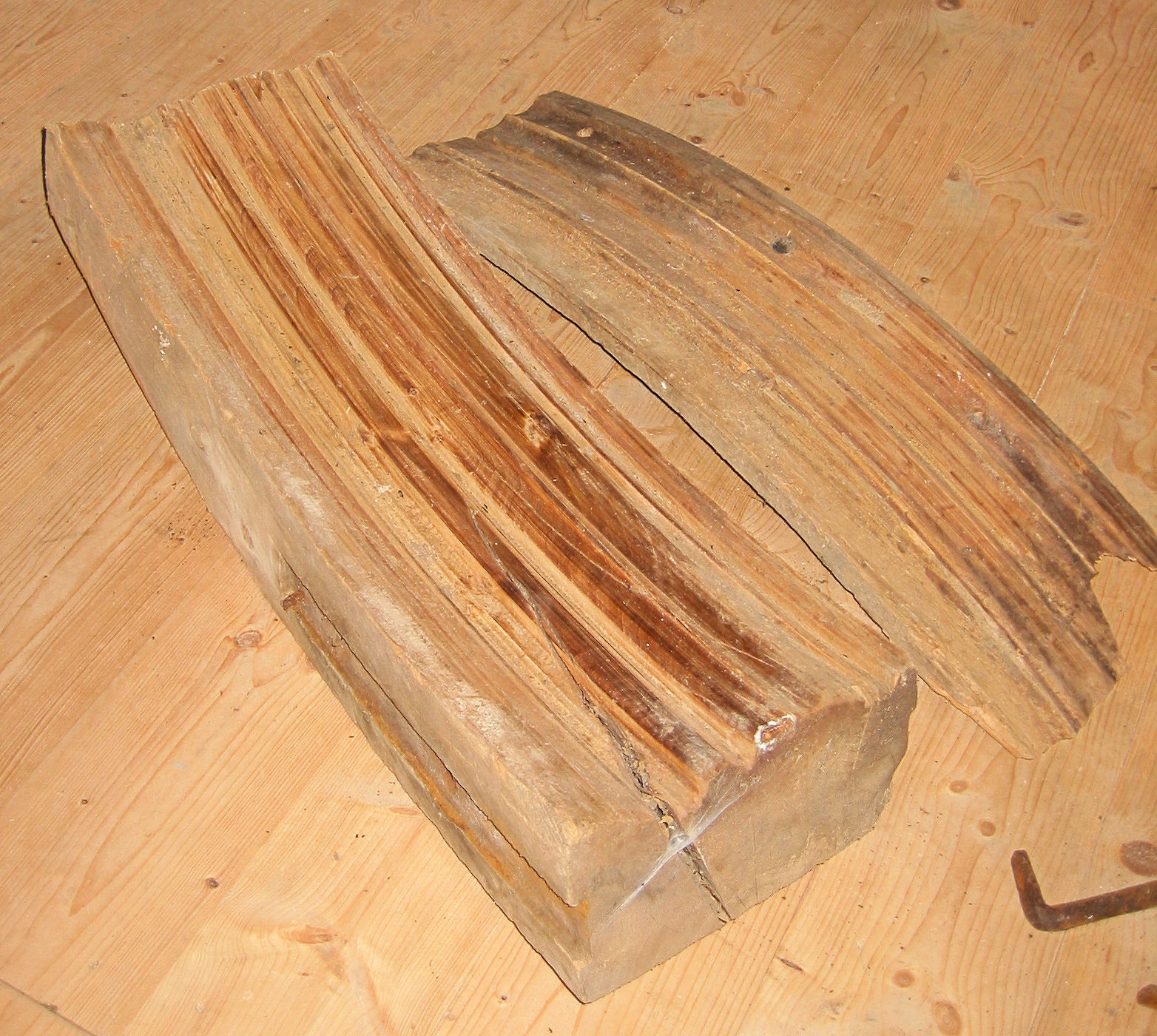 Binnenkant vangstuk en belegstuk met slijtsporen van de Concordia molen te Ede